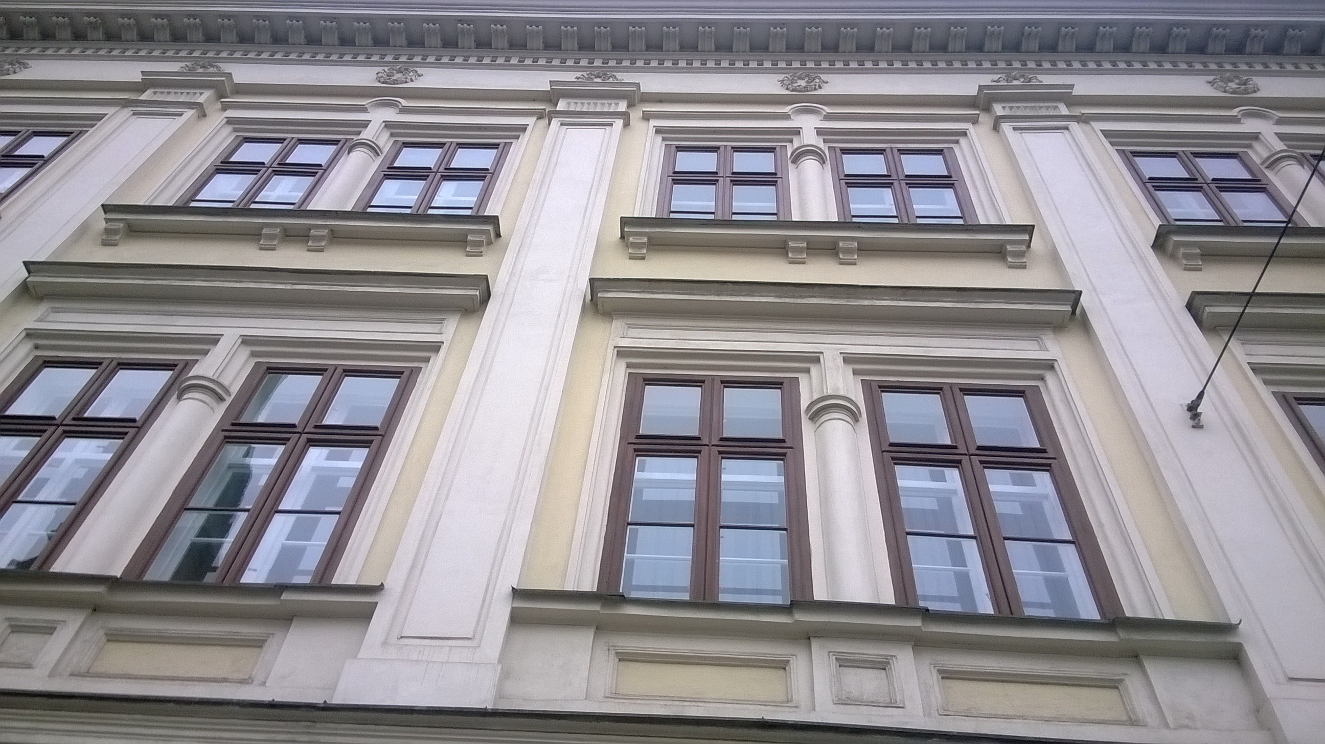 Průčelí klasicistního domu